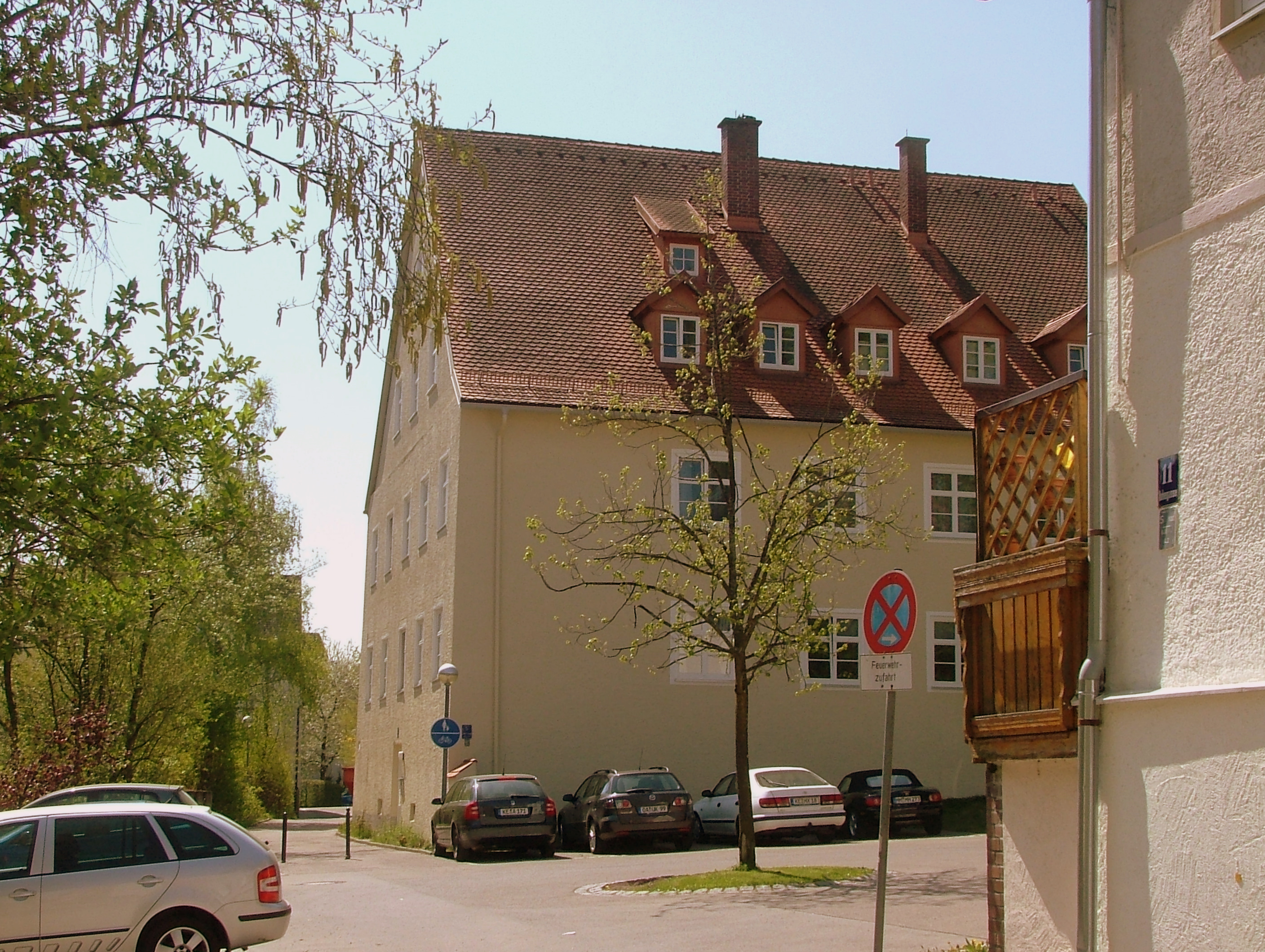 Ehem. Lazarett in Kempten